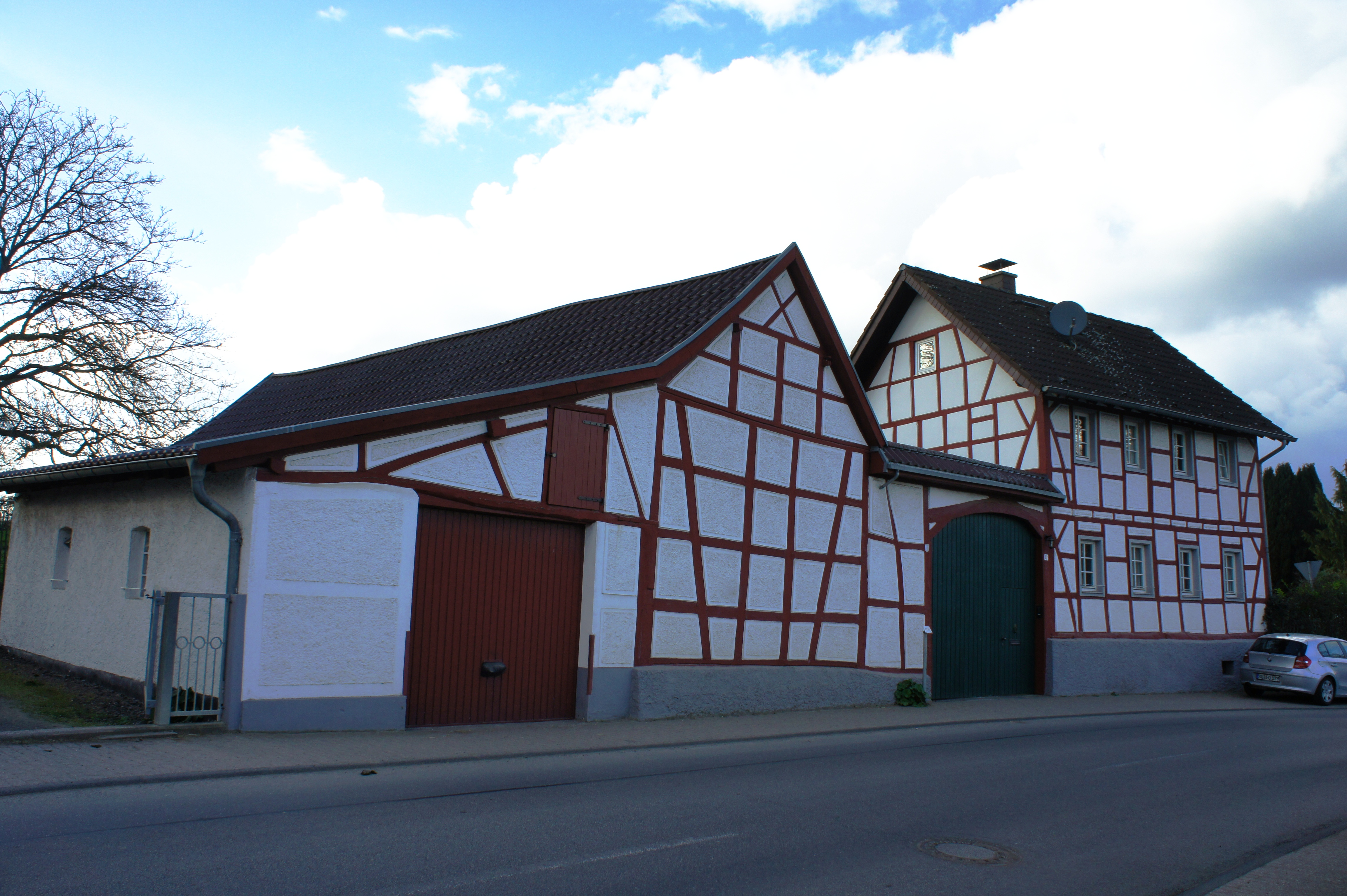 Denkmalgeschützte Fachwerkhofanlage, Villiper Weg 27, Arzdorf, Wachtberg